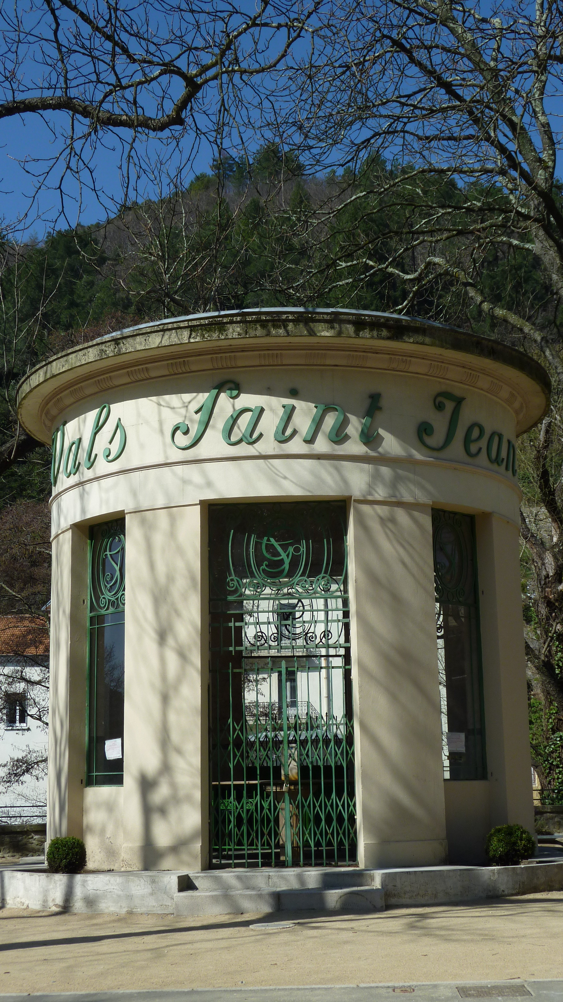 Kiosque Vals St Jean à Vals-les-Bains (07 Ardèche) plusieurs sources y arrivent. il n'est plus en service.